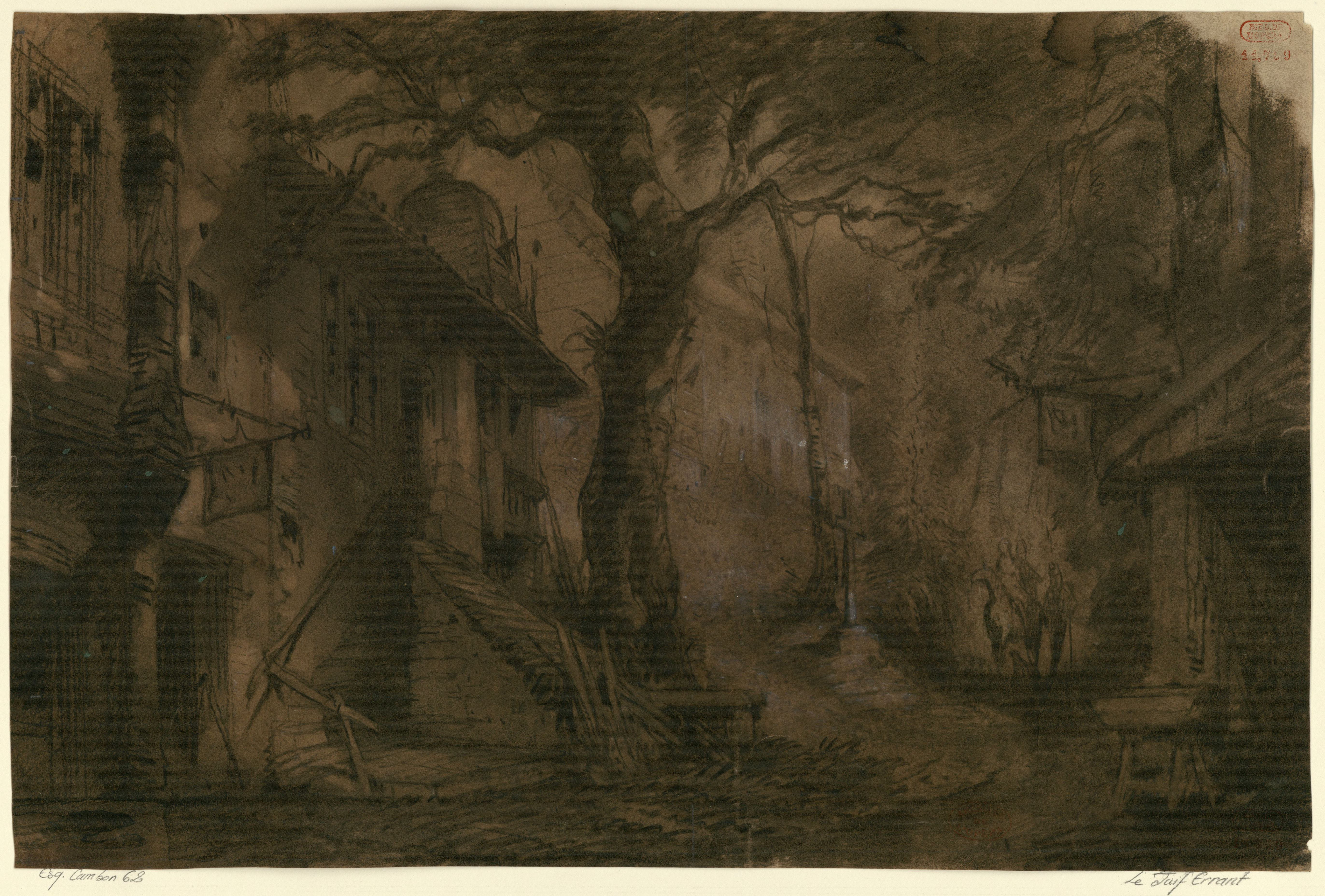 Esquisse de décor de l'acte II, tableau 1 du Juif errant, opéra de J.F. Halévy, par Charles Cambon (fusain et rehauts de blanc sur papier beige)